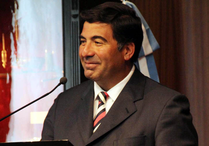 Ricardo Echegaray